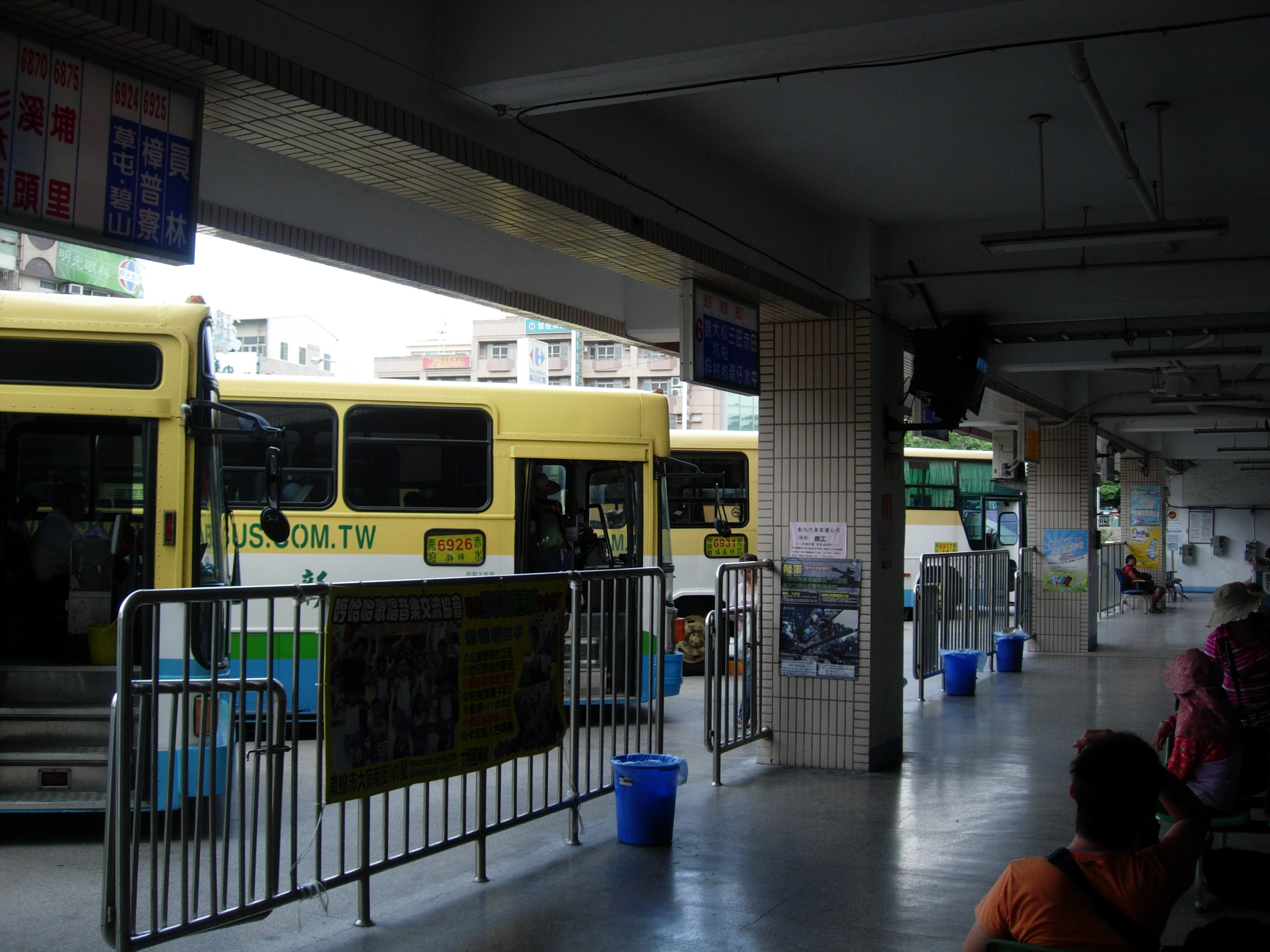 數輛彰化客運公車停靠彰化客運南投站